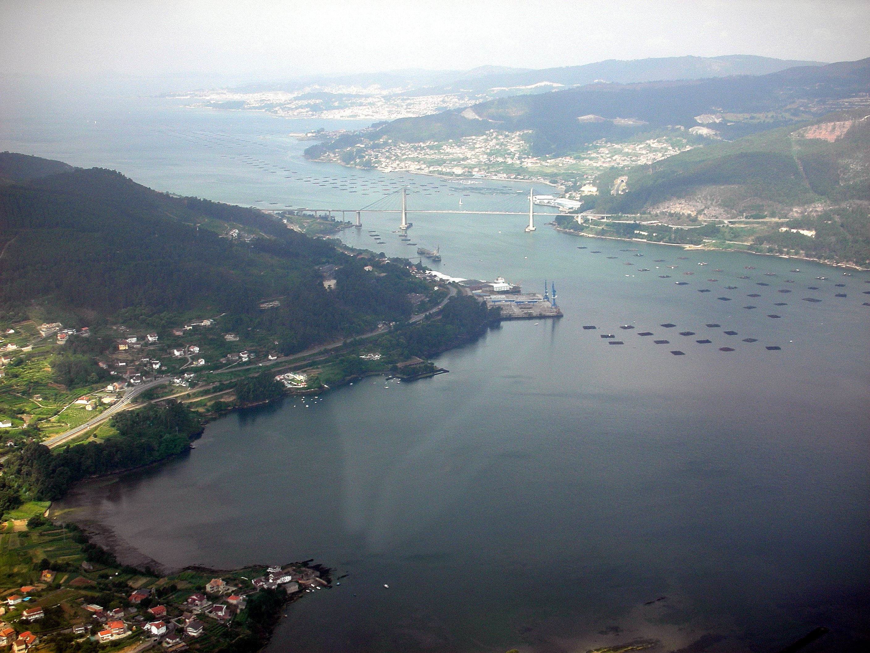 A Toxa-Ría de Vigo-Galicia. Ponte de Rande